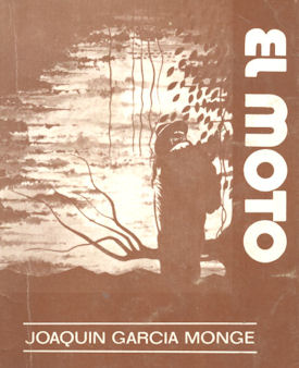 El Moto